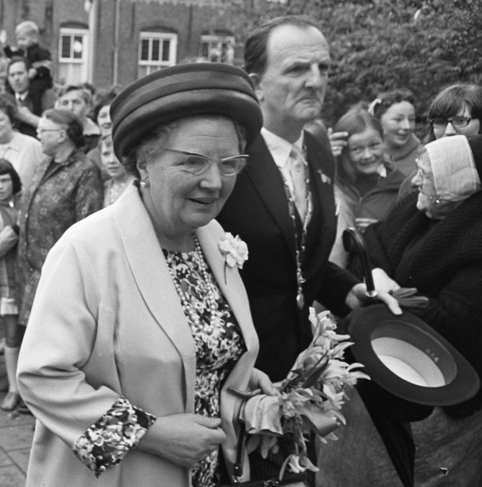 Collectie / Archief : Fotocollectie Anefo Reportage / Serie : [ onbekend ] Beschrijving : koningin Juliana bezoekt Urk Datum : 11 mei 1968 Locatie : Flevoland, Urk Trefwoorden : bezoeken, koninginnen Persoonsnaam : Juliana (koningin Nederland) Fotograaf : Kroon, Ron / Anefo Auteursrechthebbende : Nationaal Archief Materiaalsoort : Negatief (zwart/wit) Nummer archiefinventaris : bekijk toegang 2.24.01.05 Bestanddeelnummer : 921-3434